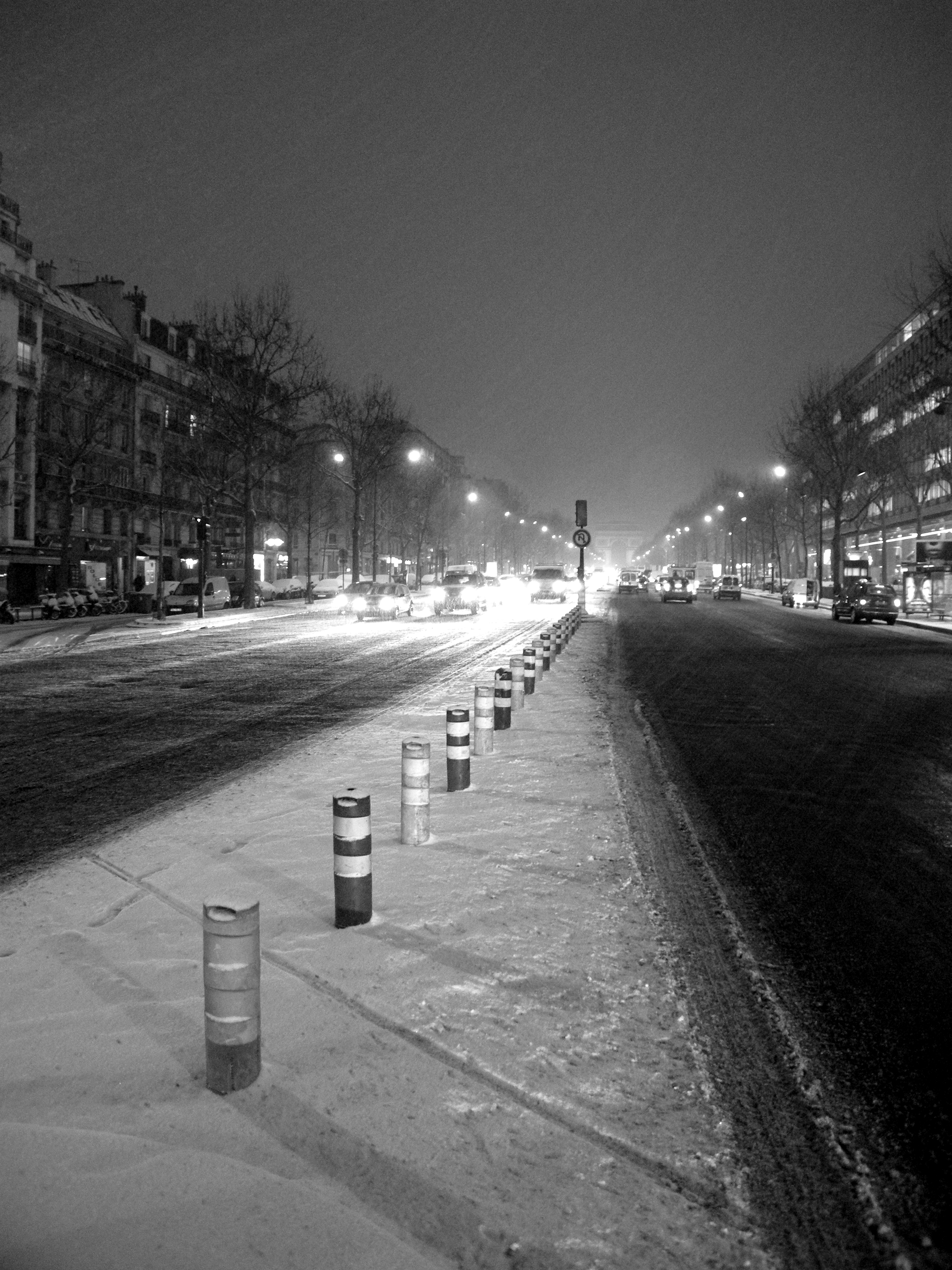 Avenue de la Grande-Armée en hiver, sous la neige, depuis la porte Maillot, Paris XVIe, France